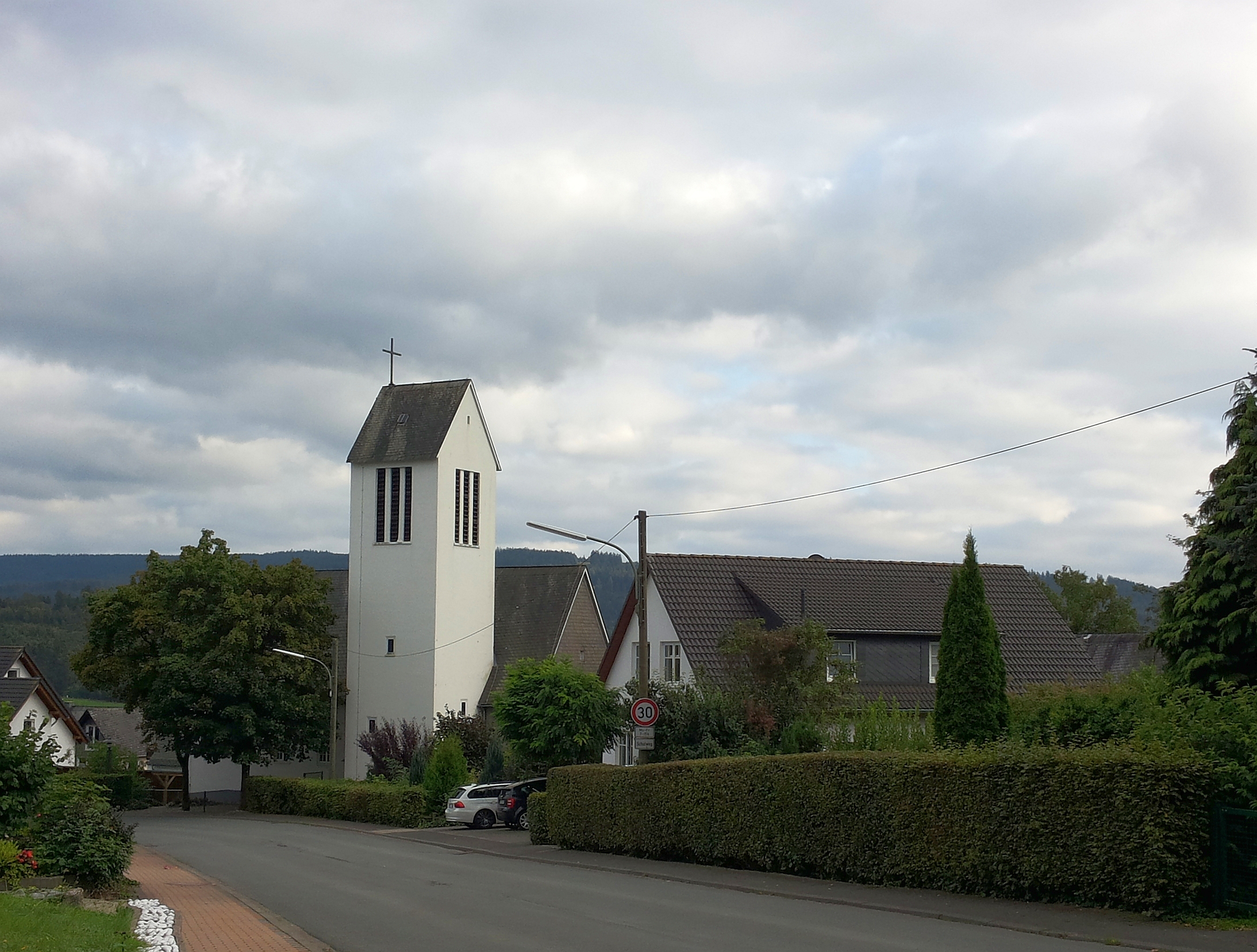 Ev. Christuskirche in Schmallenberg (Germany)